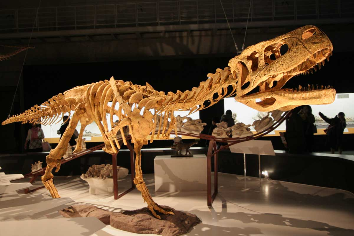 Aucasaurus - 01